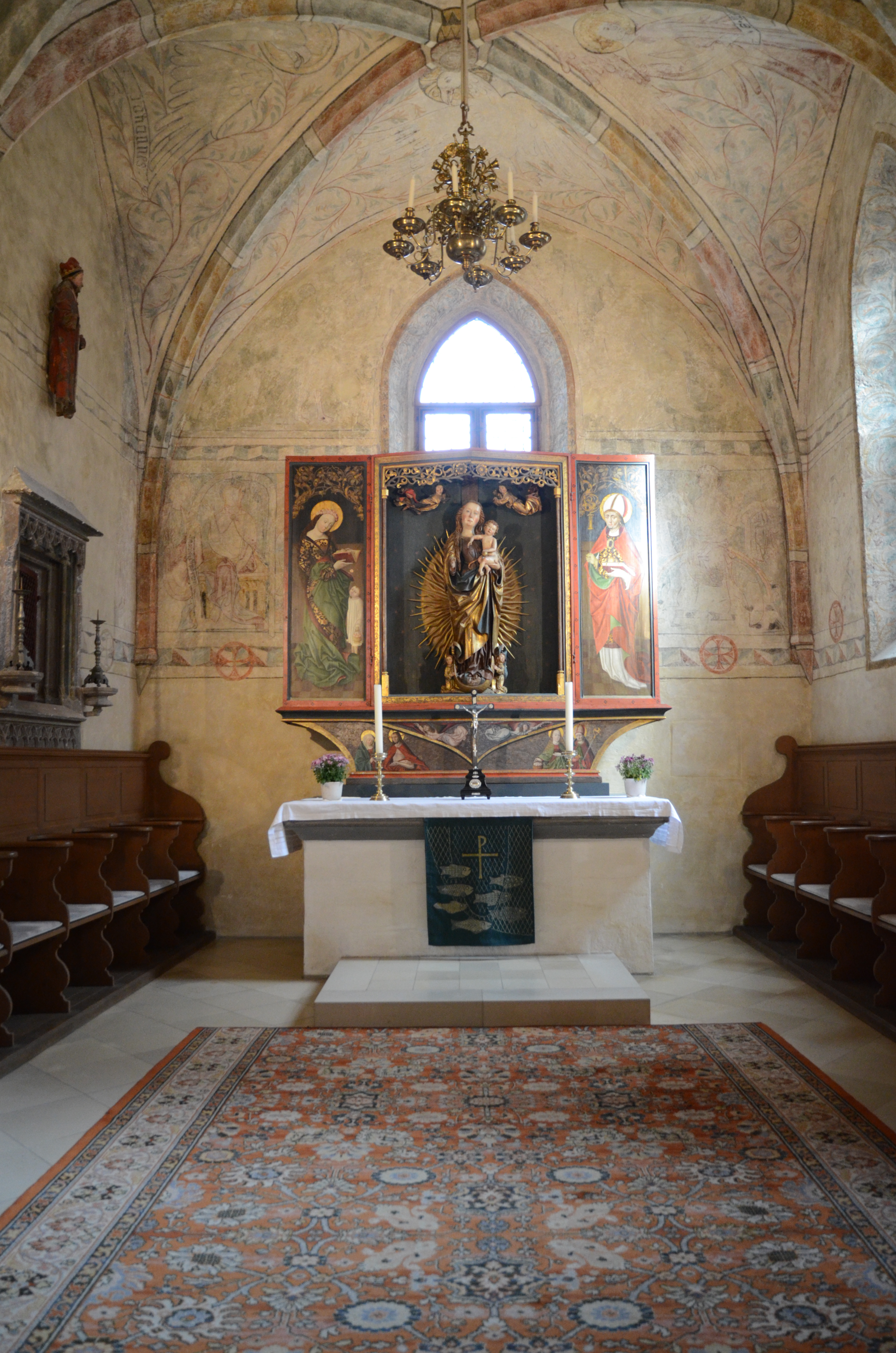 Spitalirche in Dinkelsbühl, Innenausstattung